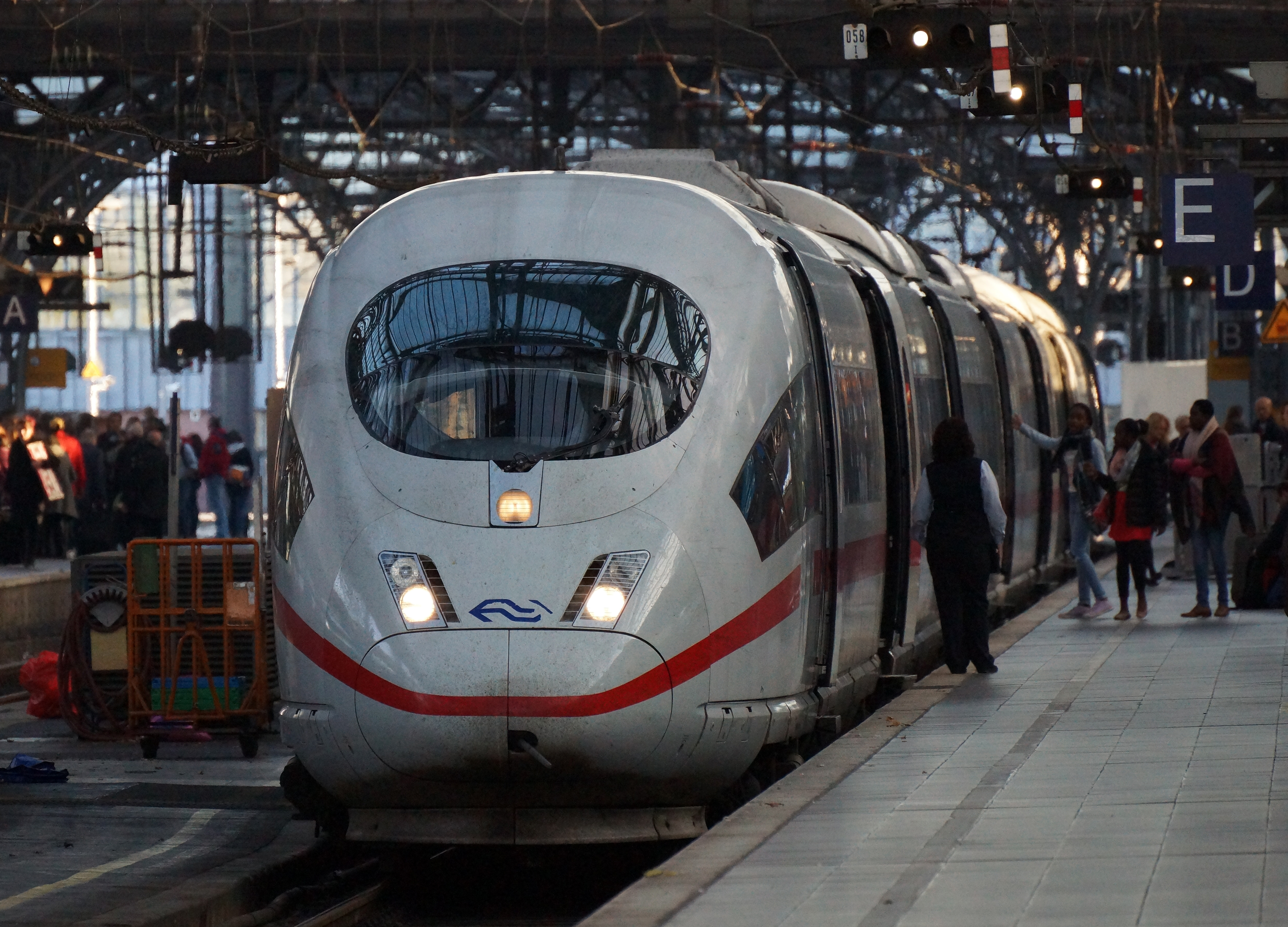 NS 4651 (DBAG 406 051-3) als ICE 14 von Frankfurt nach Brüssel im Kölner Hauptbahnhof.